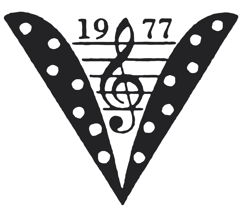 Viljo vesterinen -kilta ry:n logo. Suunnitellut Jukka Ollila. Julkaistu ensimmäisessä Viljo Vesterinen -harmonikkakilpailun käsiohjelmassa 1978.